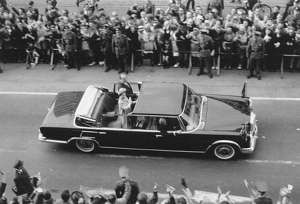 Queen Elisabeth II., Staatsbesuch in Duisburg 1965, Königstraße